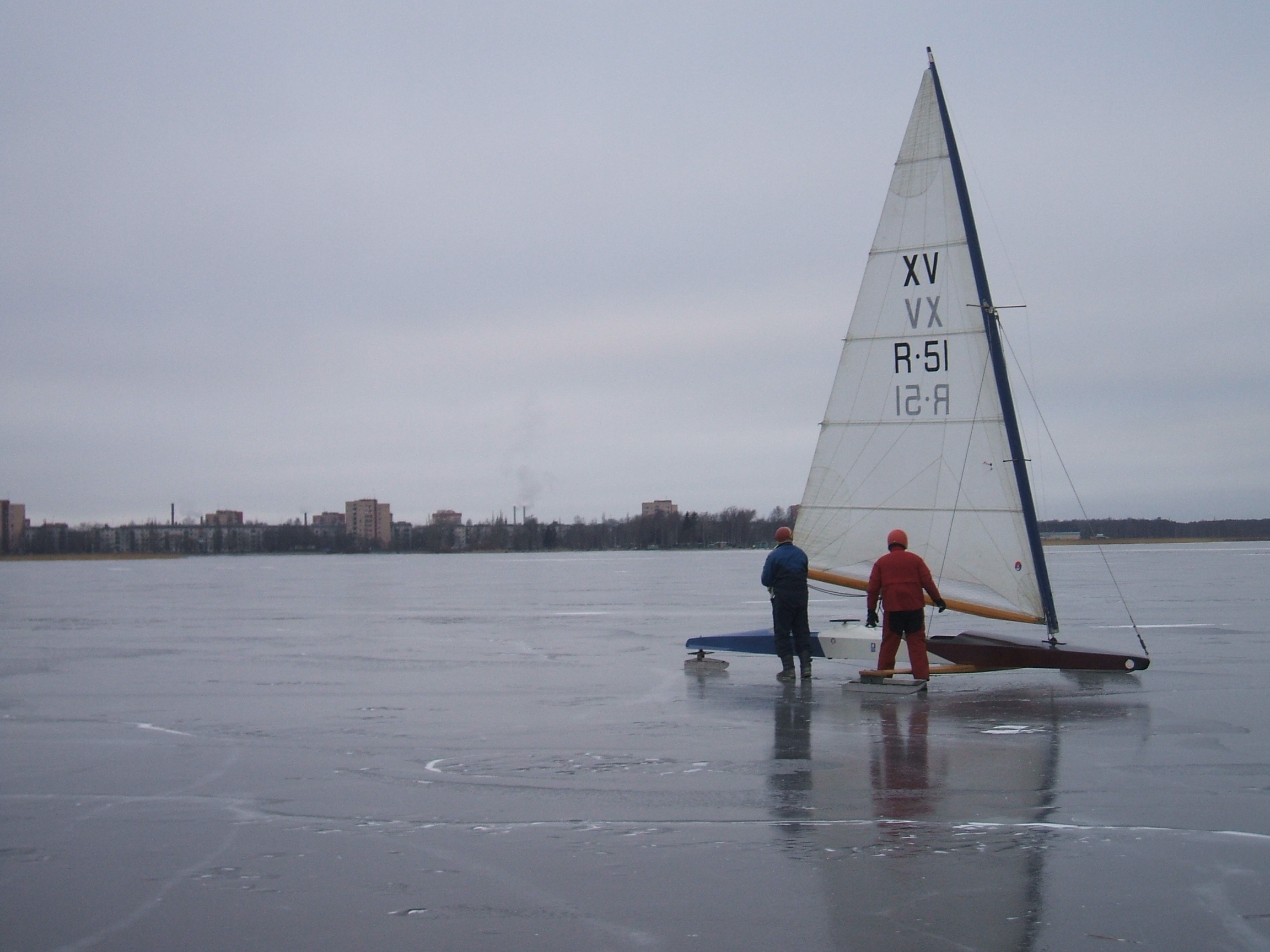 Буера на Сестрорецком Разливе